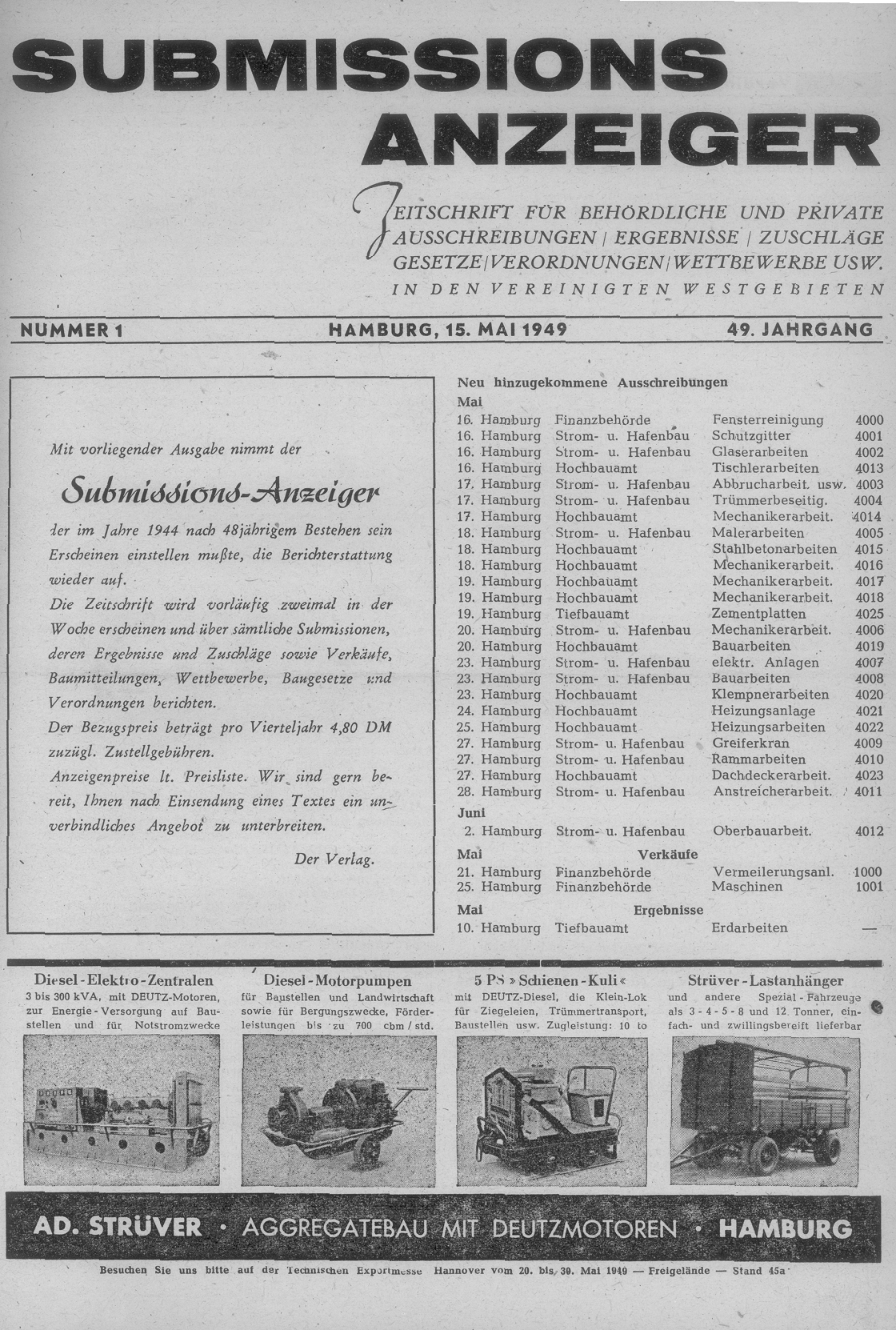 Titel Submissions-Anzeiger 1949 - Erste Nachkriegsausgabe